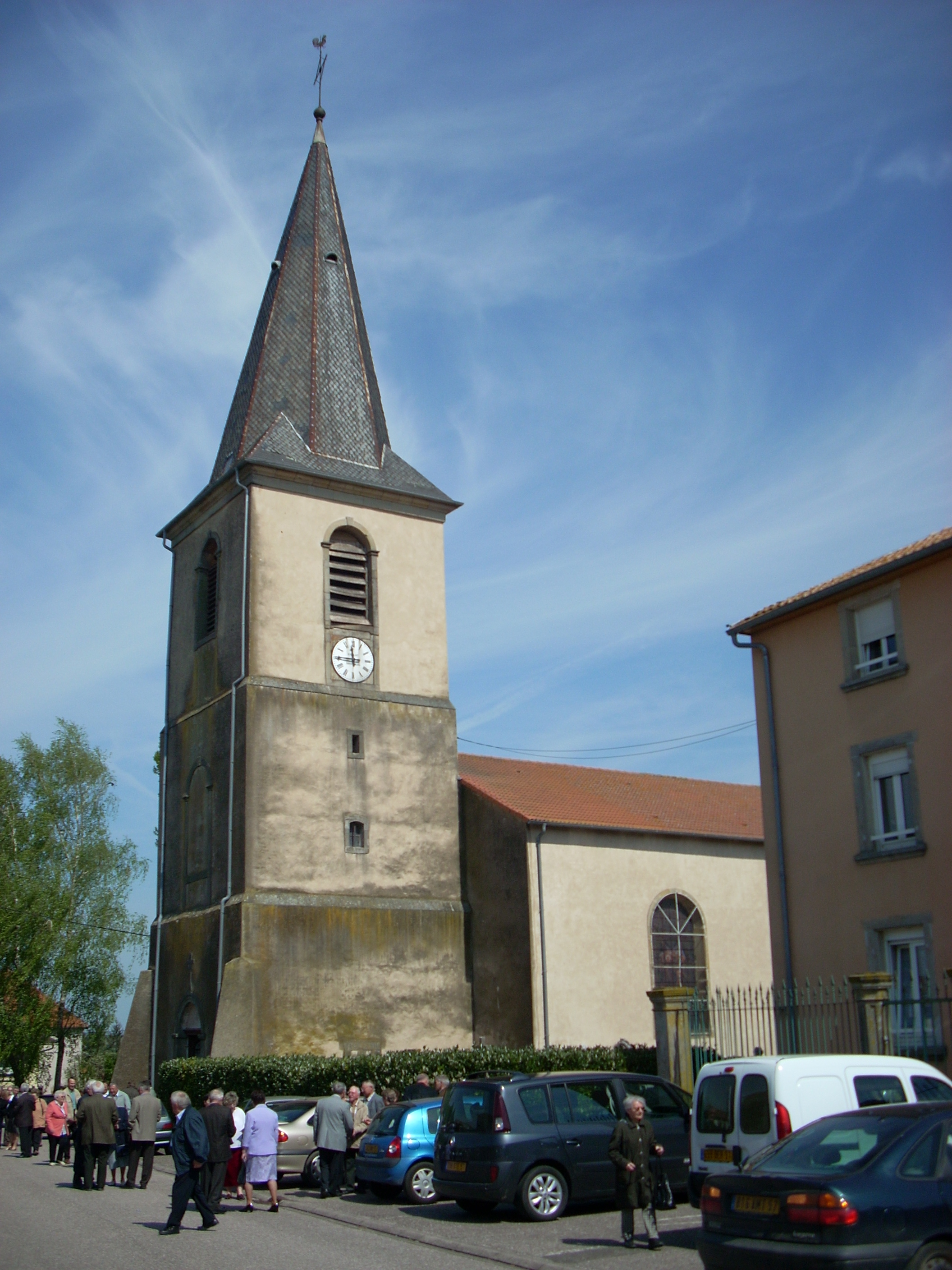 Church in Maizières-lès-Vic, Moselle, Lorraine, France